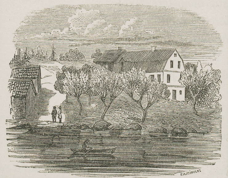 Ekensbergs wärdshus, träsnitt